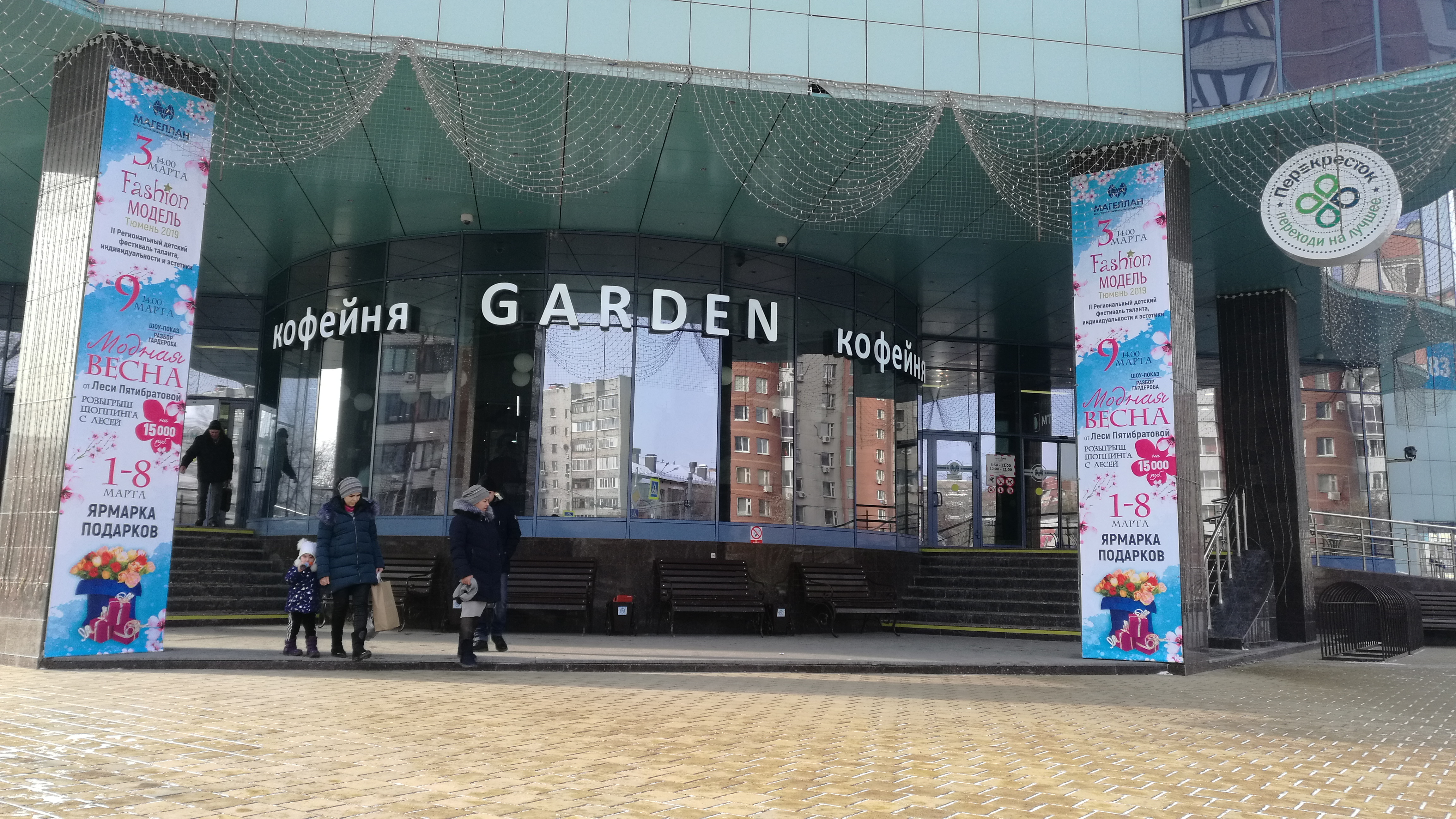 La aĉetcentro Magellan. Tjumeno, Rusio.